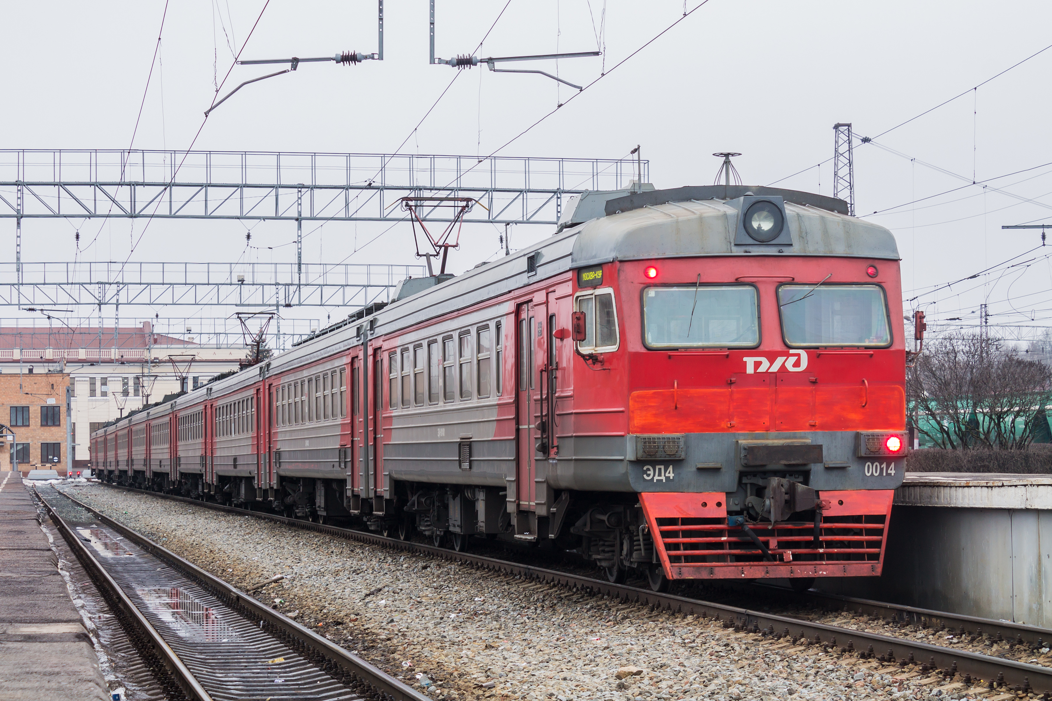 ЭД4-0014, Тула-Курская см. фото 692224 в альбоме автора